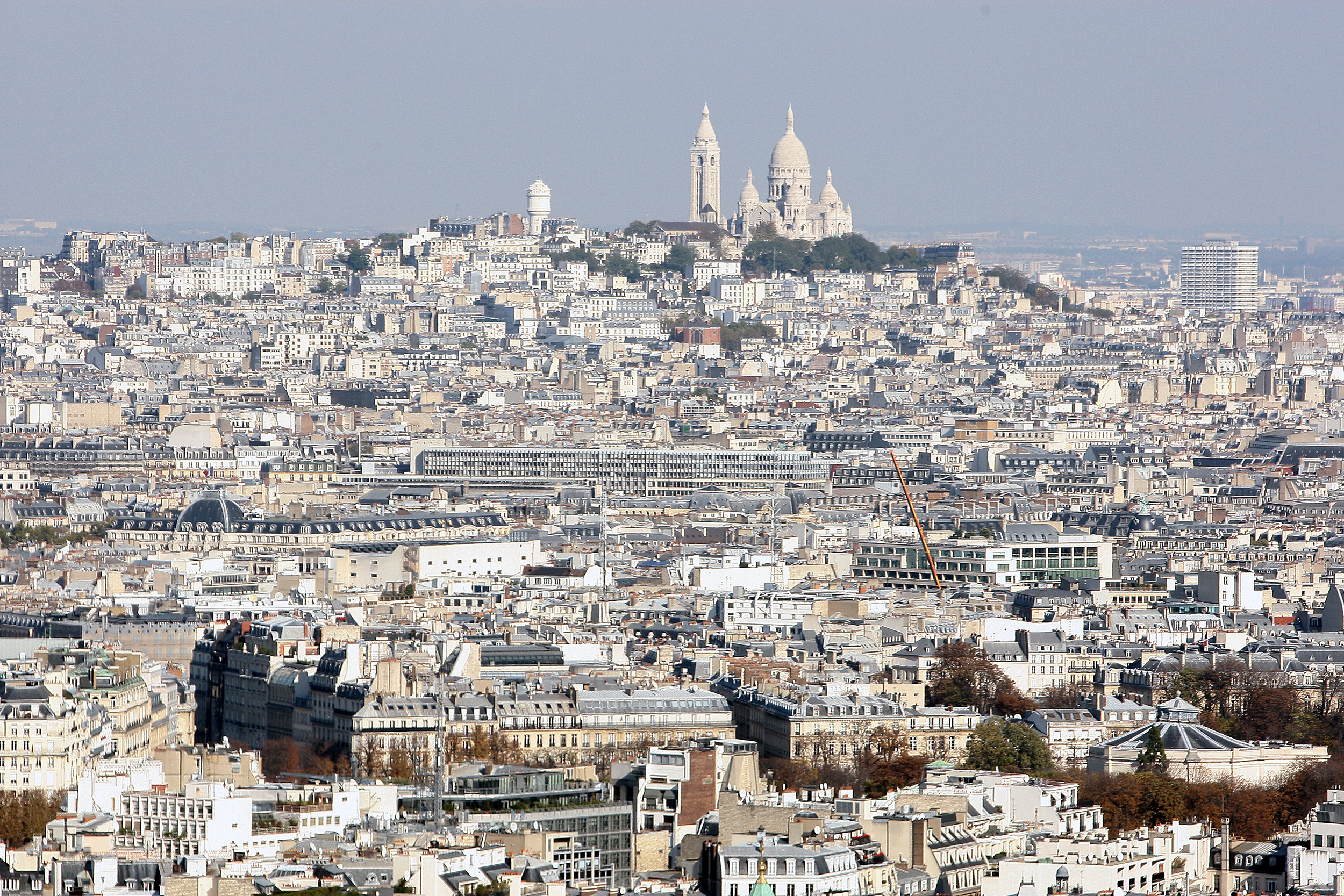 Basilica Sacre Coeur din Paris, vedere din Turnul Eiffel